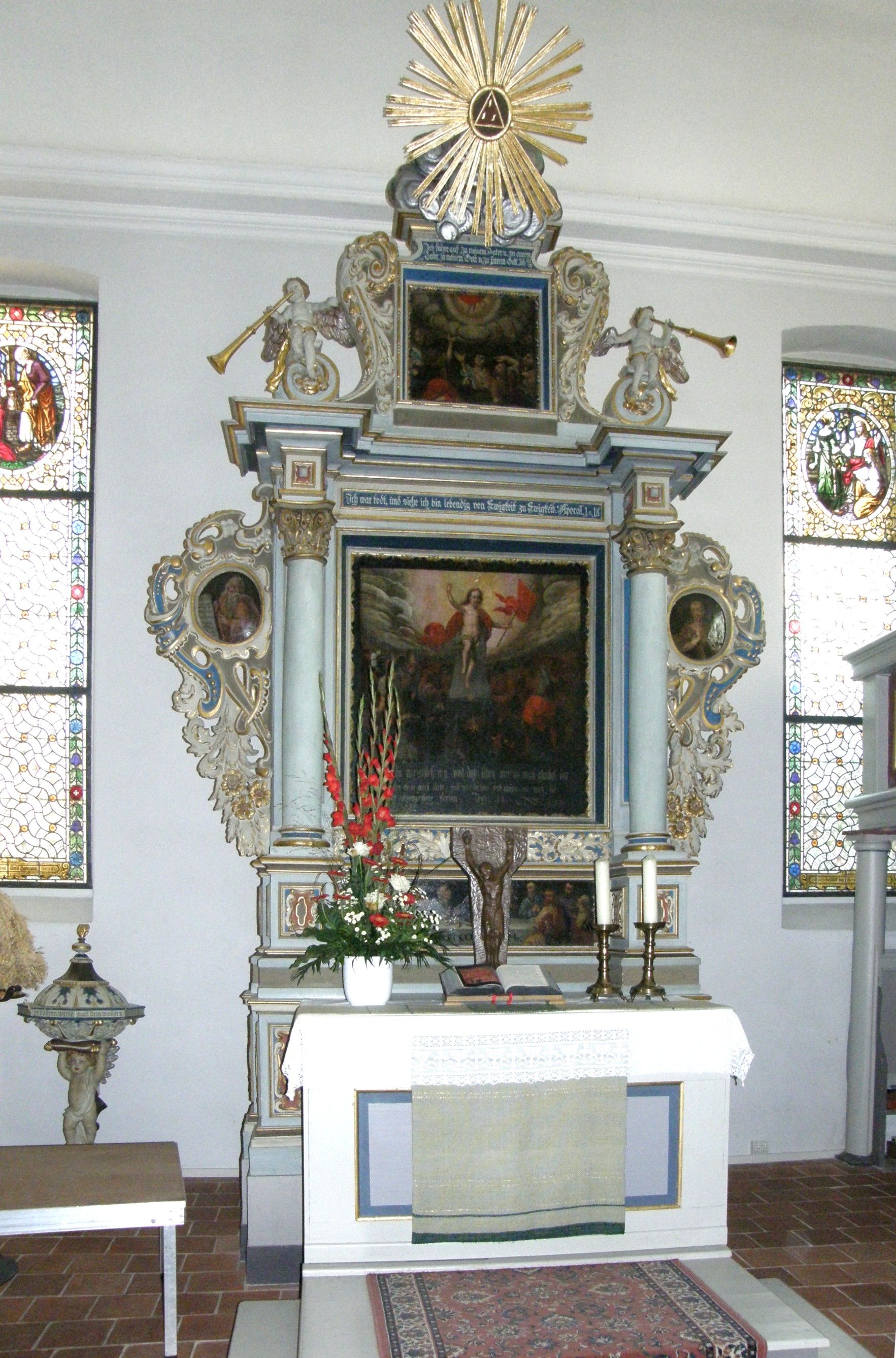 Berlin-Kaulsdorf, Jesuskirche: Altar und zwei Altarfenster